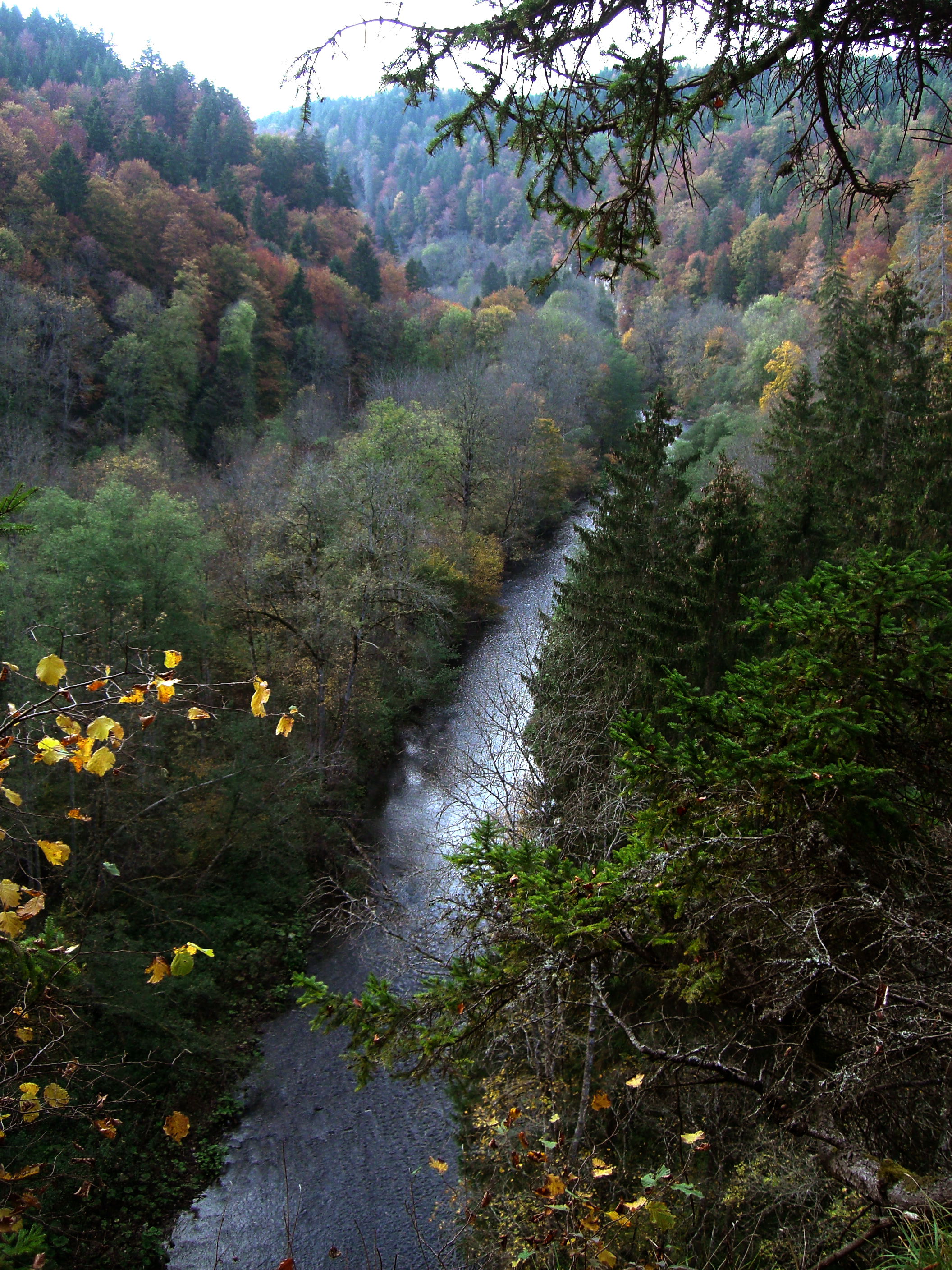 Wutachschlucht. Blick auf die Wutach